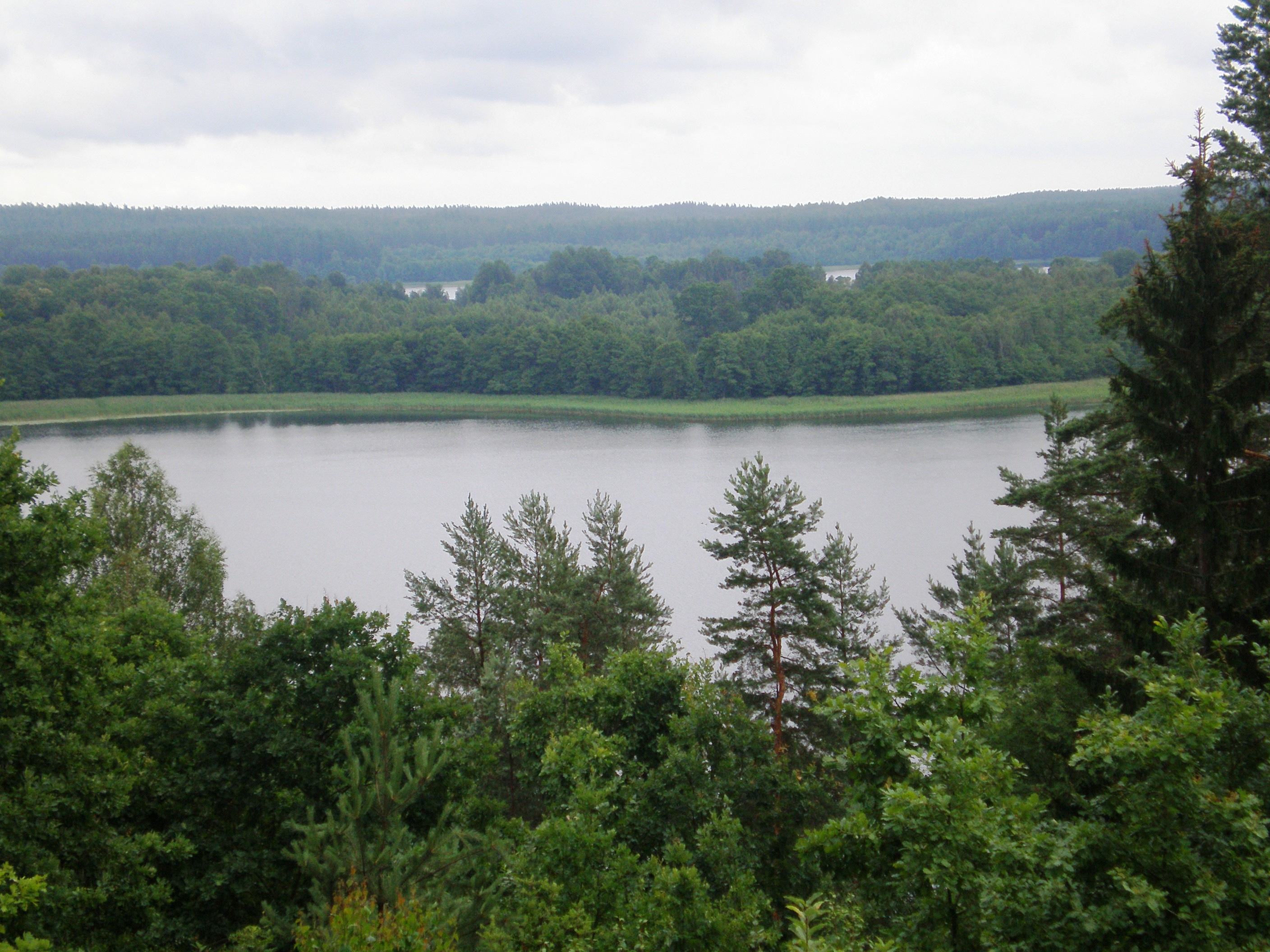 Linkmenas Lake and Aisėkas lake from Ladakalnis